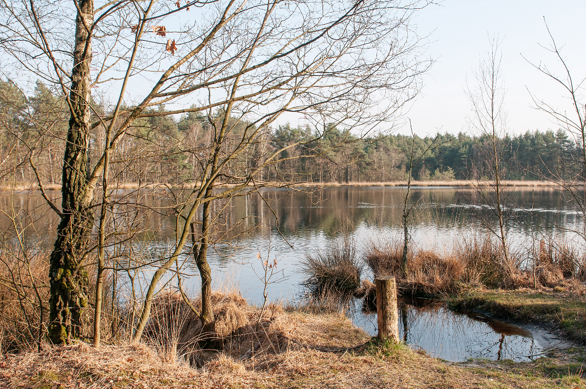 Zicht op het Turfven